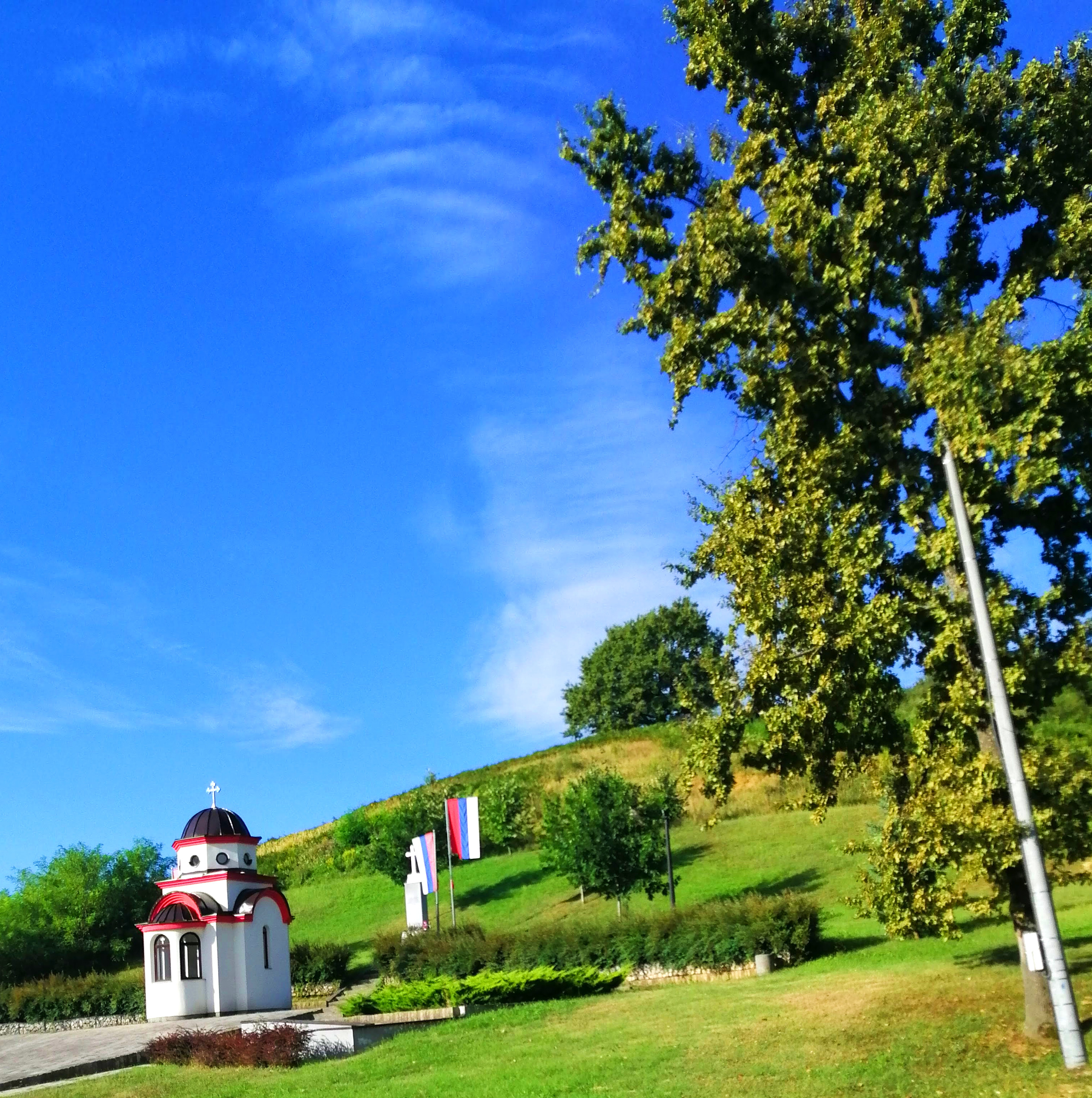 Spomenik podignut u znak sjećanja na stradanje 41 Srbina sa Čardaka za vrijeme Rata u BiH.